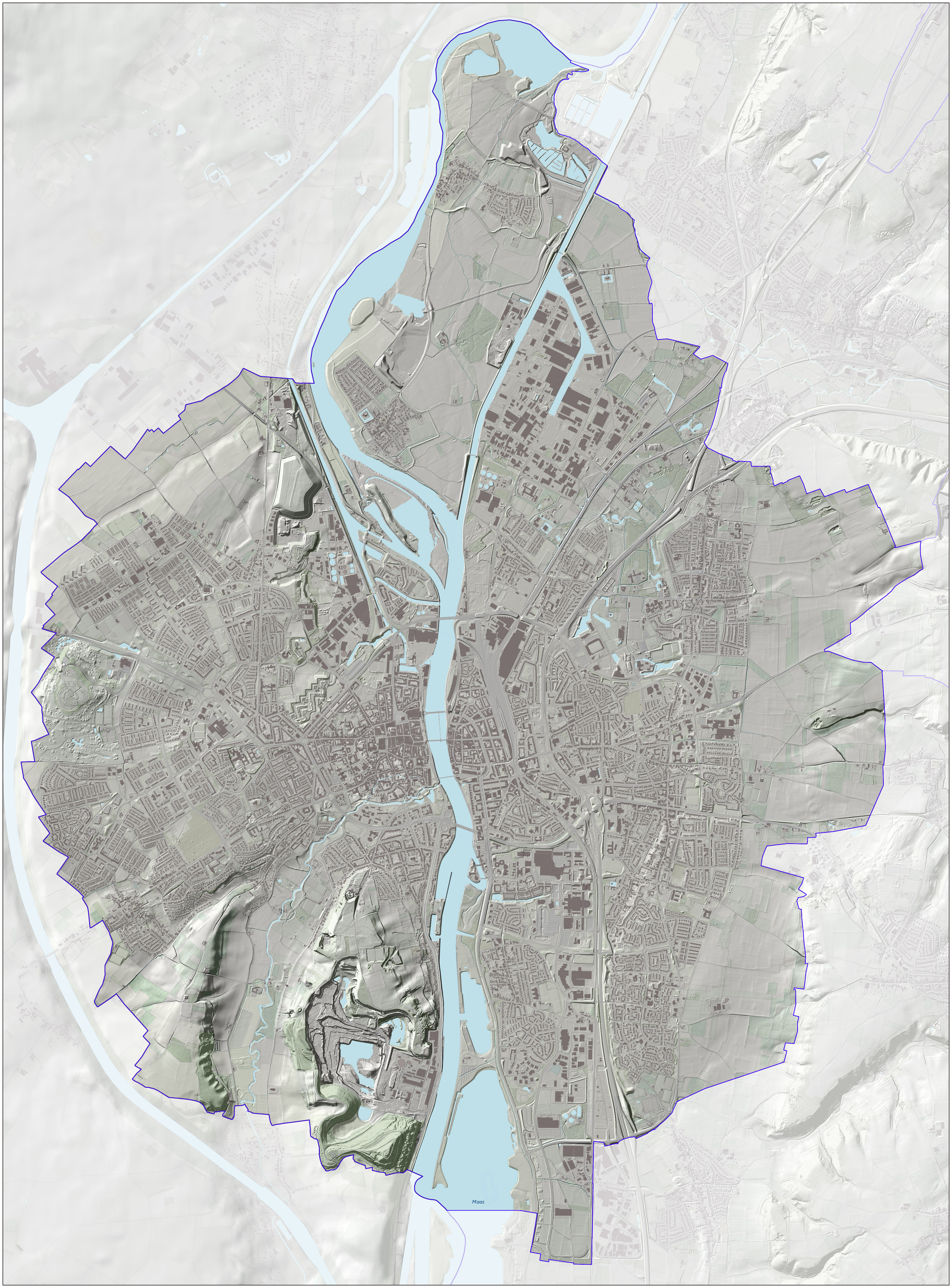 Reliëfbeeld van de gemeente, o.b.v. het Actuele Hoogtebestand Nederland (AHN2, open data) met subtiele elementen uit de Basisregistratie Topografie (BRT/Top10NL, open data). Kaartbeeld samengesteld door Jan-Willem van Aalst.